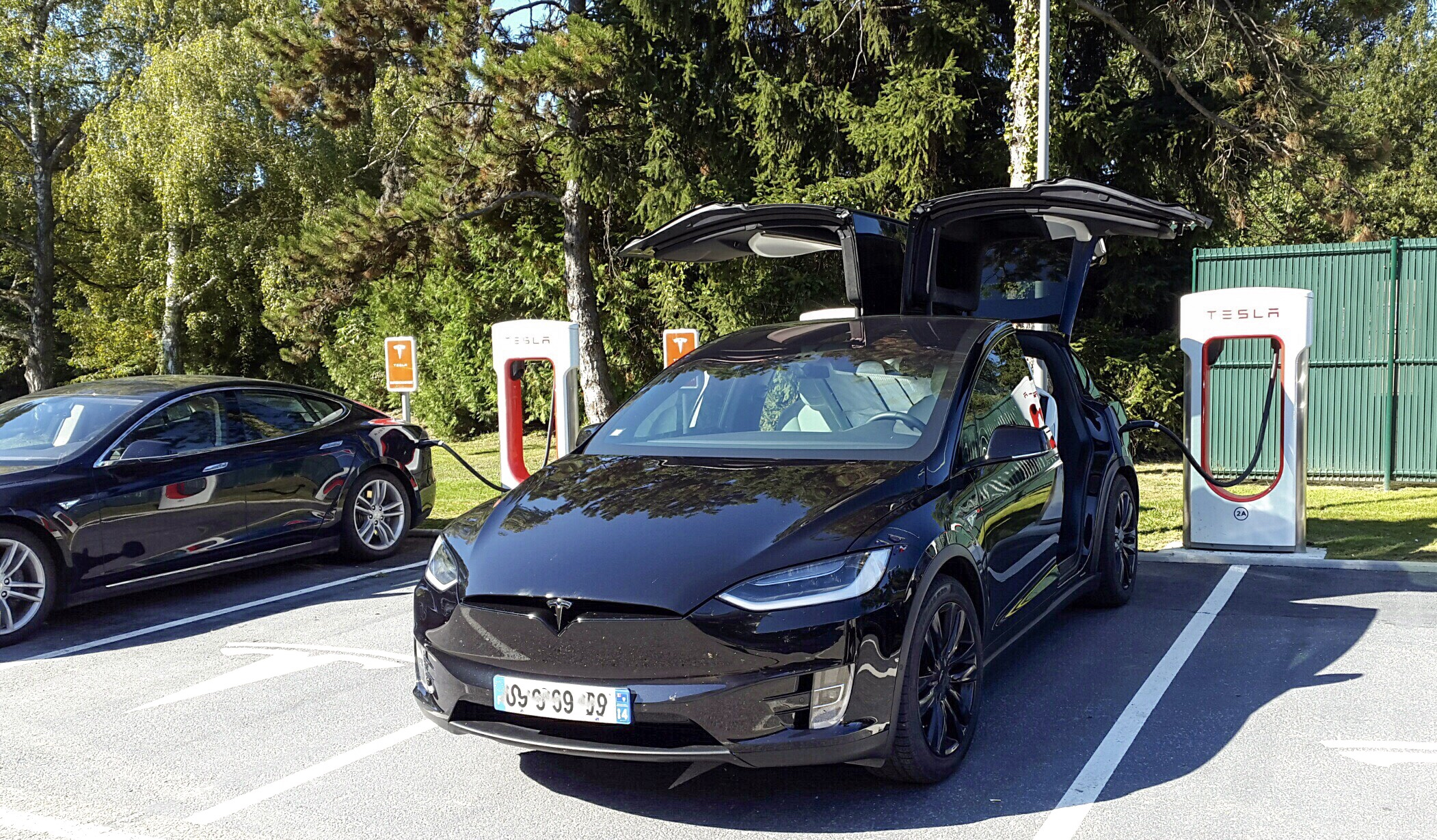 Tesla electric car charger